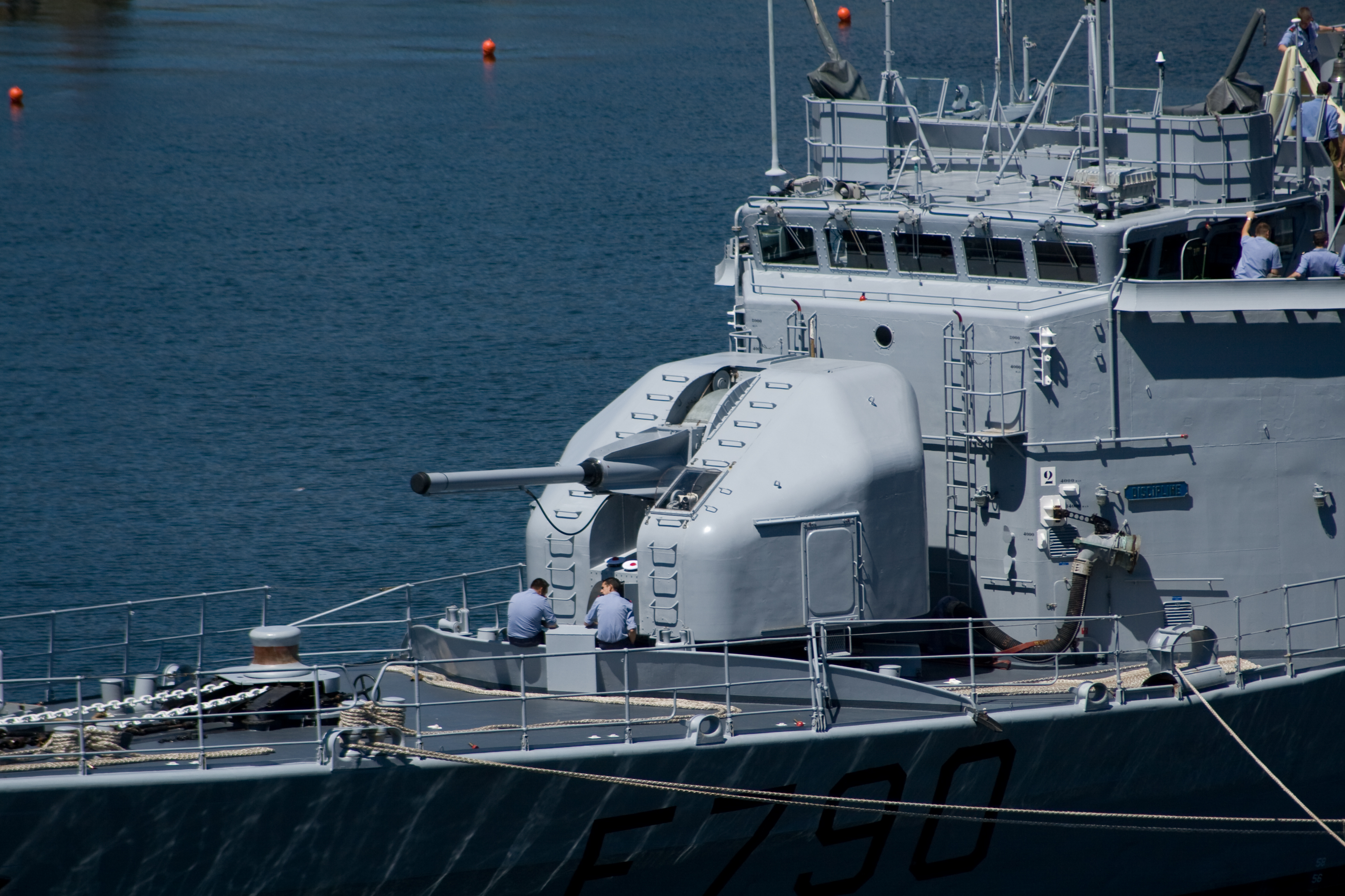 Canon de 100 mm sur la plage avant du Lieutenant de vaisseau Lavallée